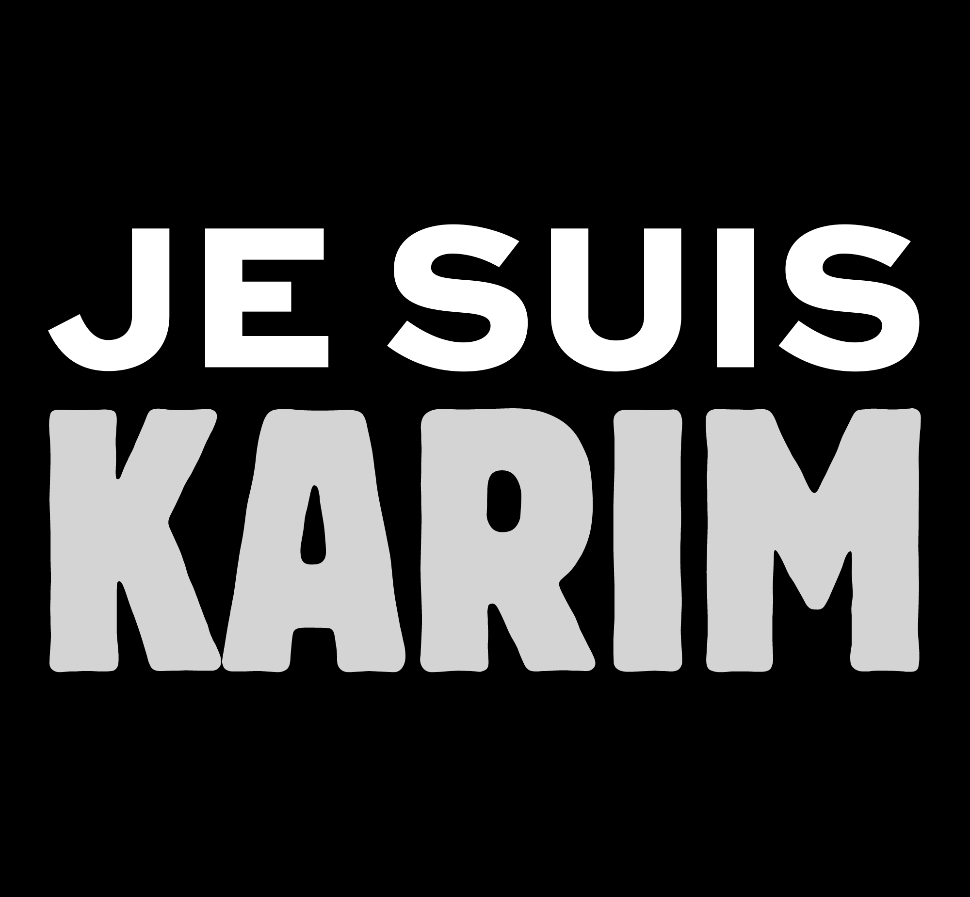 Pancarte « Je suis Karim » qui défend les droits de Karim Wade, prisonnier politique au Sénégal.